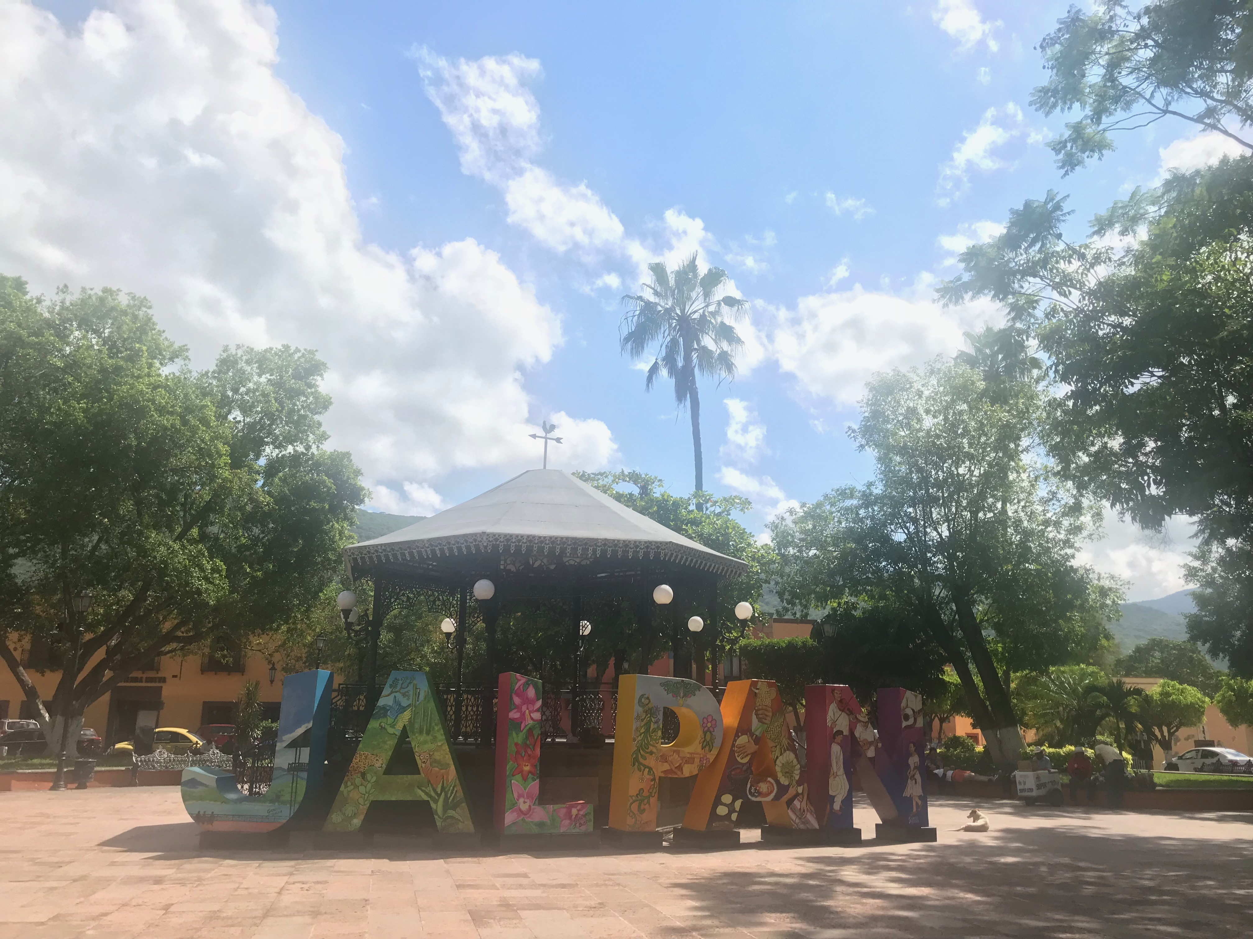 Vista lateral izquierda de la Plazoleta Central de Jalpan de día